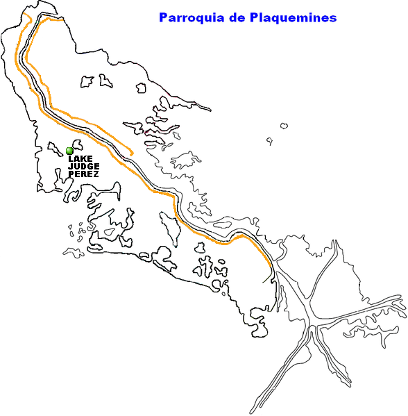 Lake Judge Perez (localidad), Louisiana.